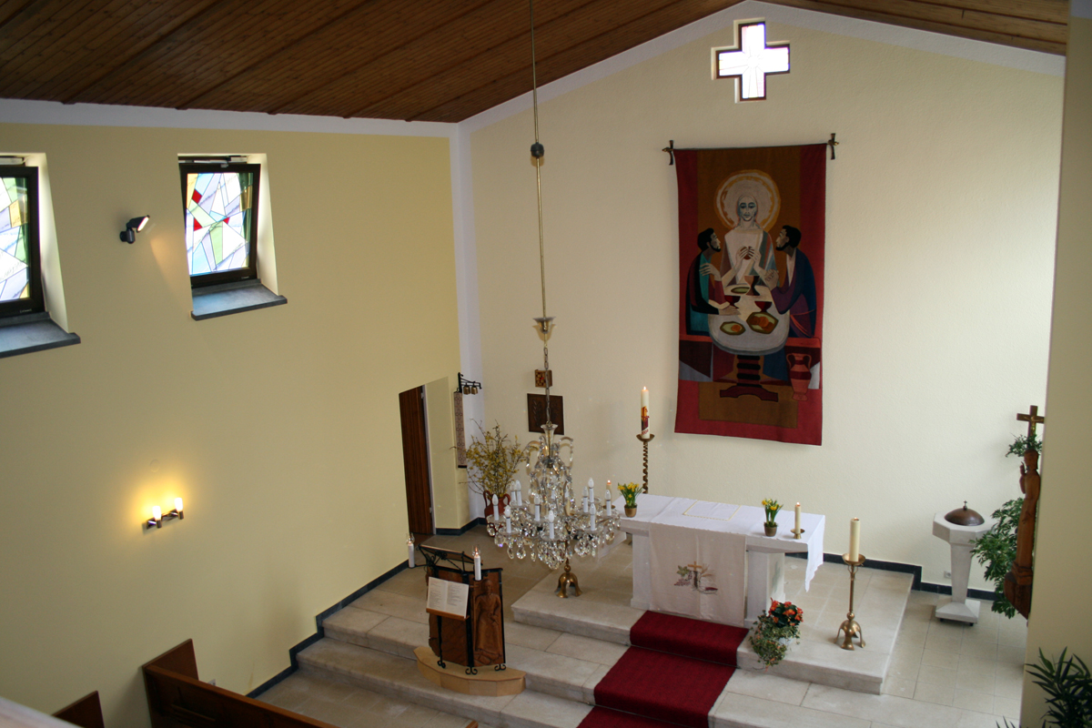 Innenansicht und Altarraum von St.Peter & Paul, Weidenberg